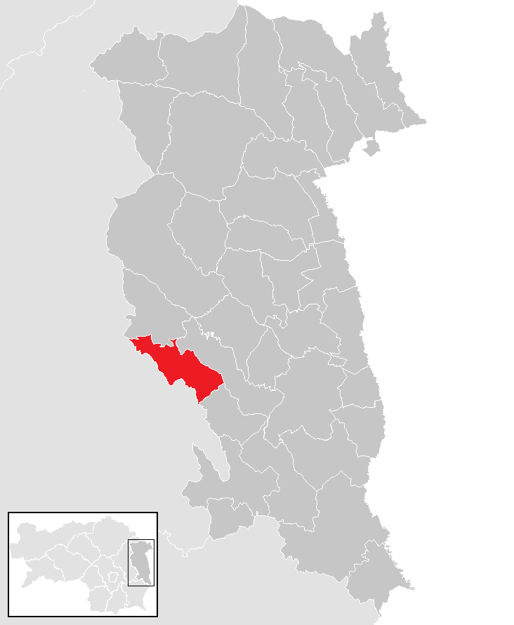 Lage von Feistritztal im Bezirk Hartberg-Fürstenfeld